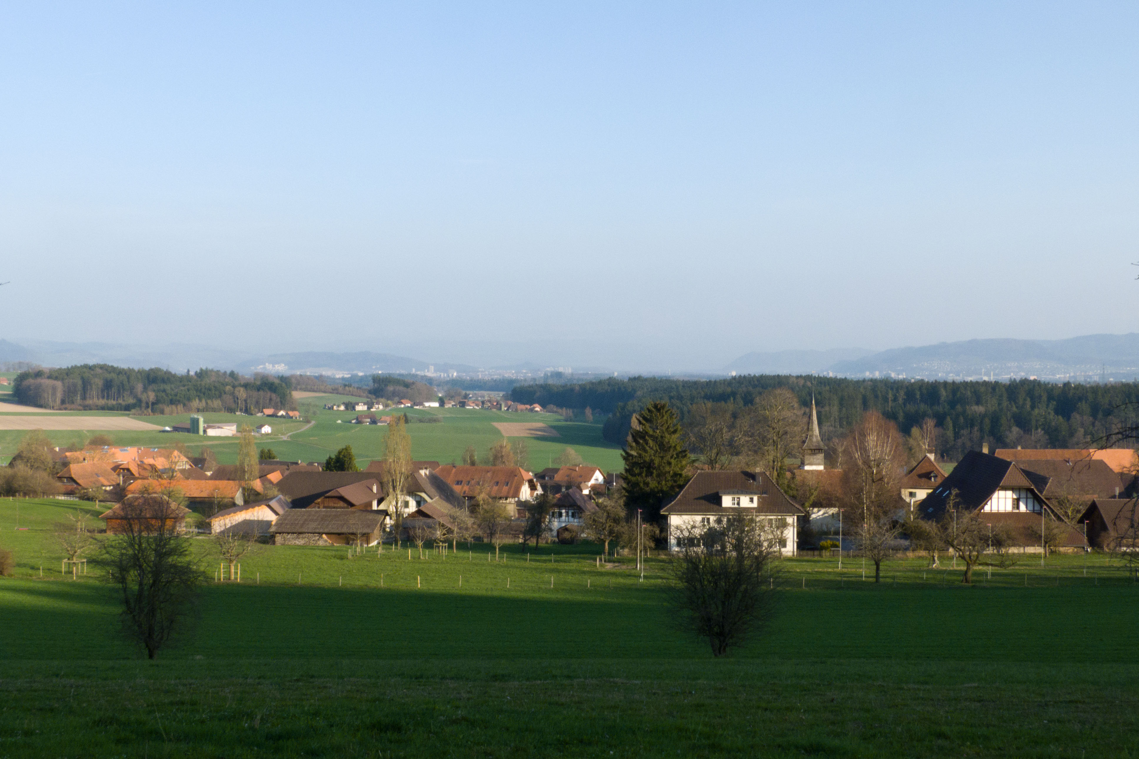 Meikirch von Norden